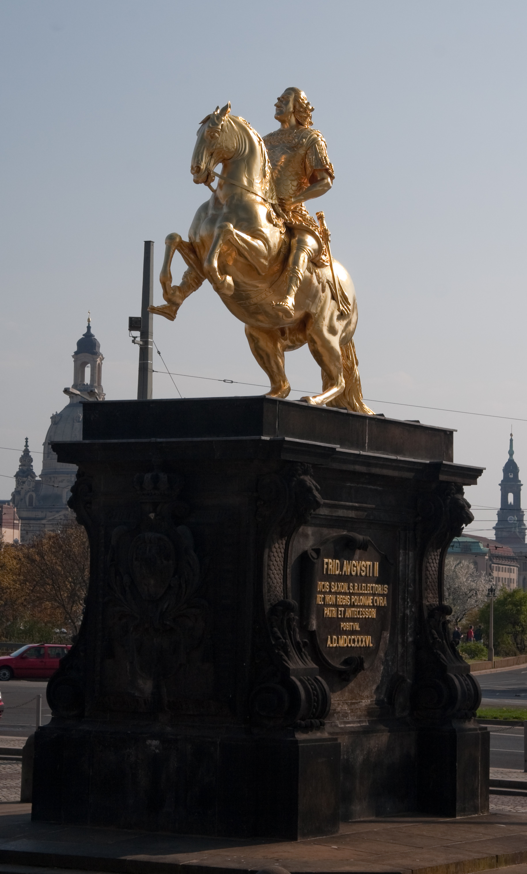 "Goldener Reiter" in Dresden. 51°3′29.1″N 13°44′28.8″E / 51.058083°N 13.741333°E